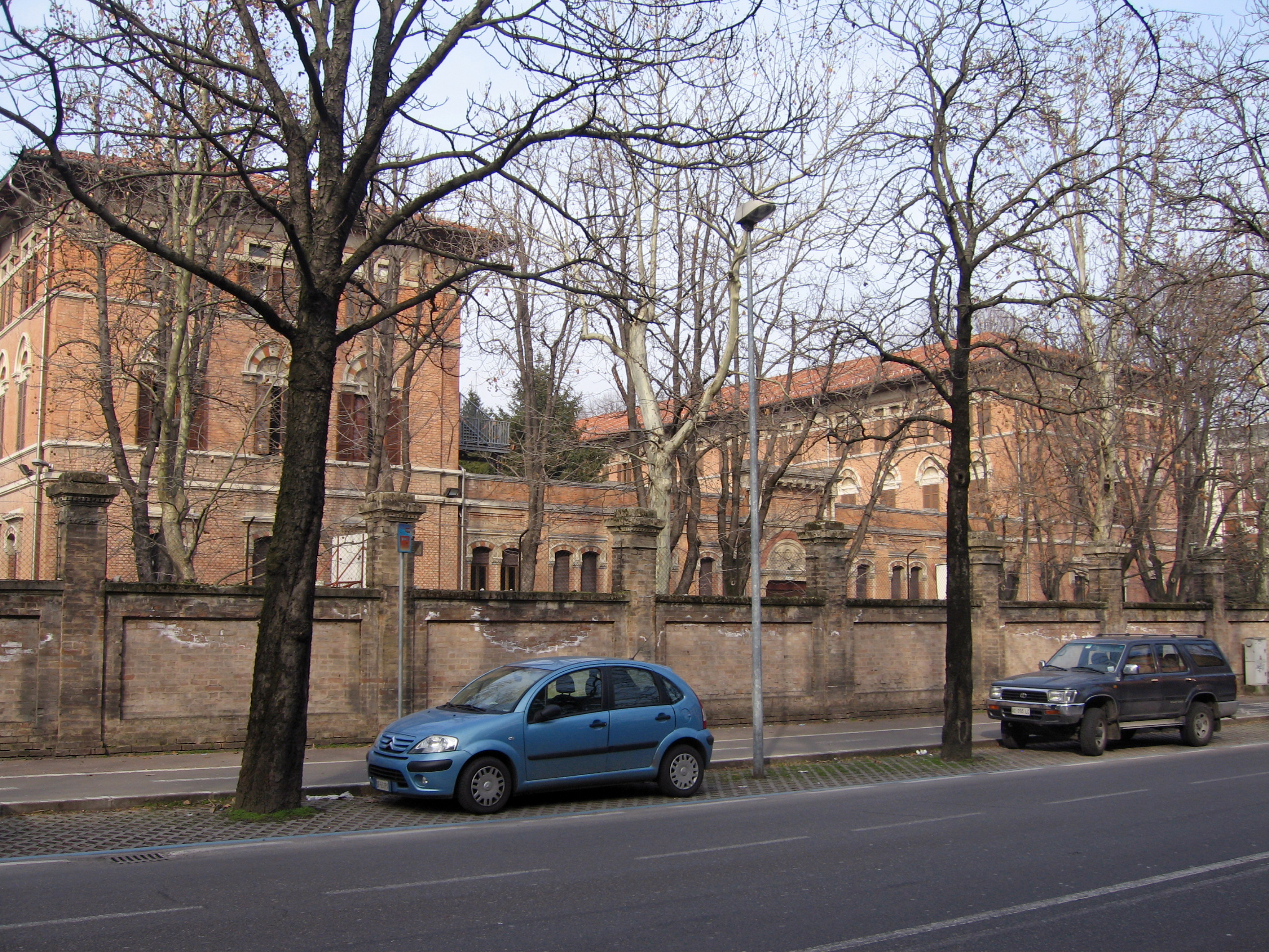 Seminario Minore (Parma) - facciata sud